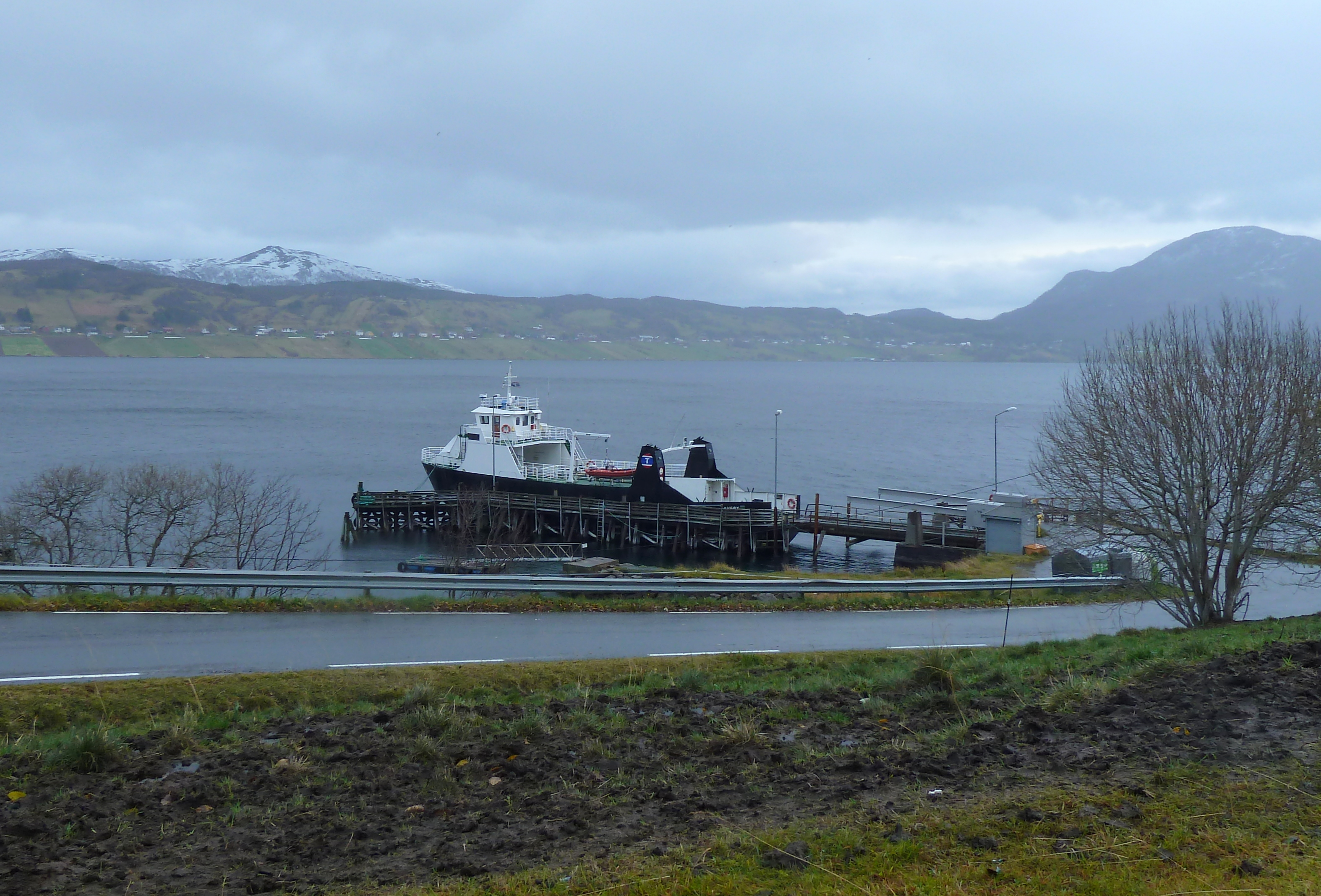 Bilferga "Kveøy" før ombyggingen. Her ligger hun i opplag i fergekaia på Kveøya (tatt 18. desember 2010).